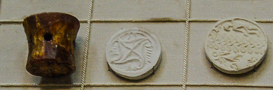 Siegel aus dem kretischen Vorpalastzeit.